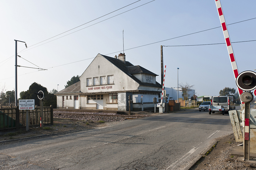 Ancienne gare SNCF fermée de St André des eaux